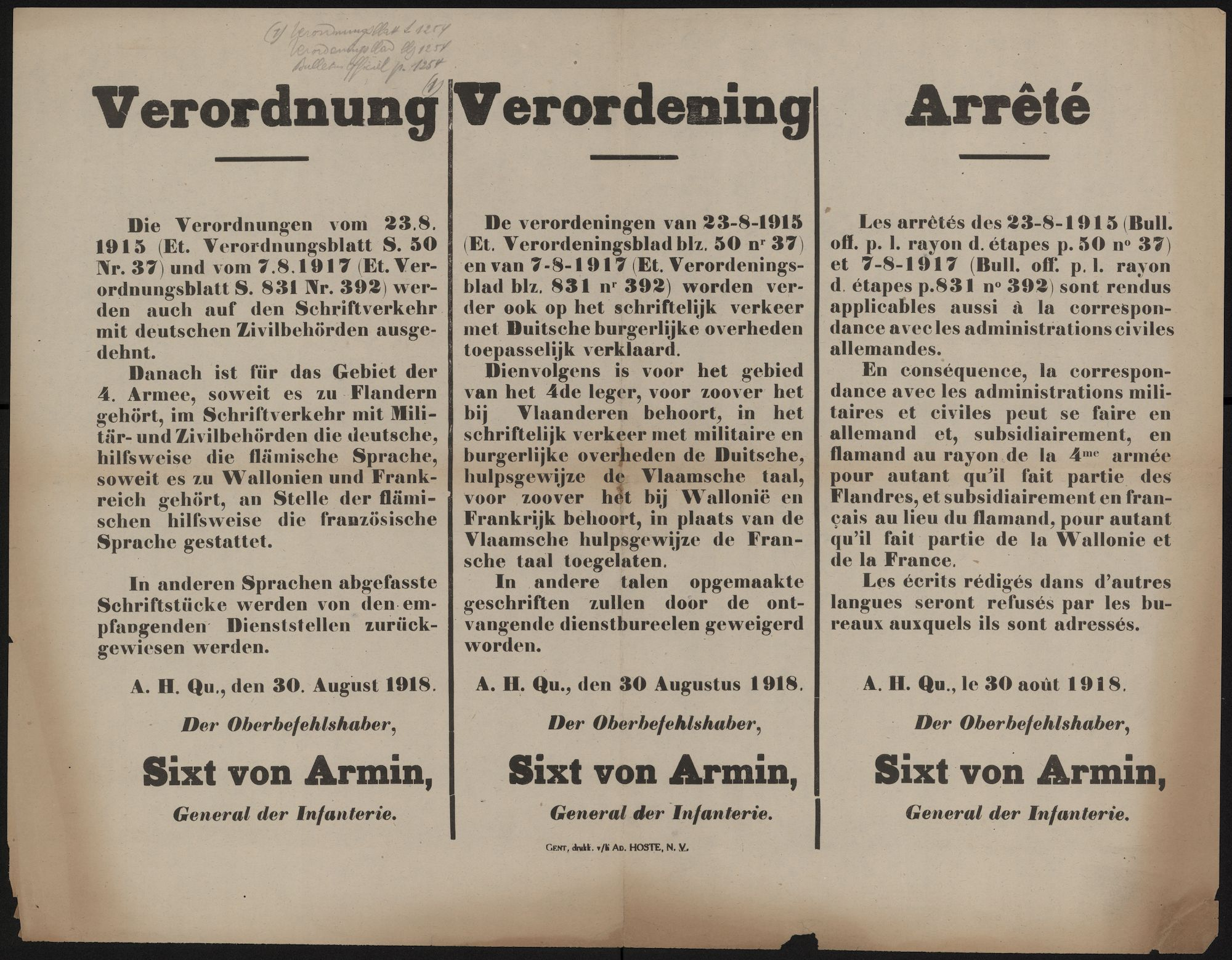 De Duitsche, hulpsgewijs de Vlaamsche taal